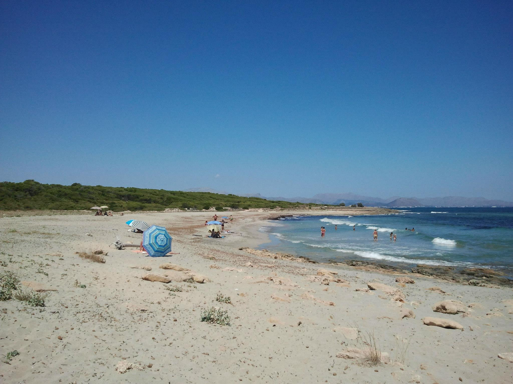 Platja de son Real, Santa Margalida, Mallorca, Spain. Blick von der südöstlichen Seite - diese Seite wird auch Platja des Dolç genannt.